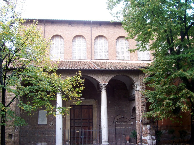 Roma - Basilica di S. Sabina